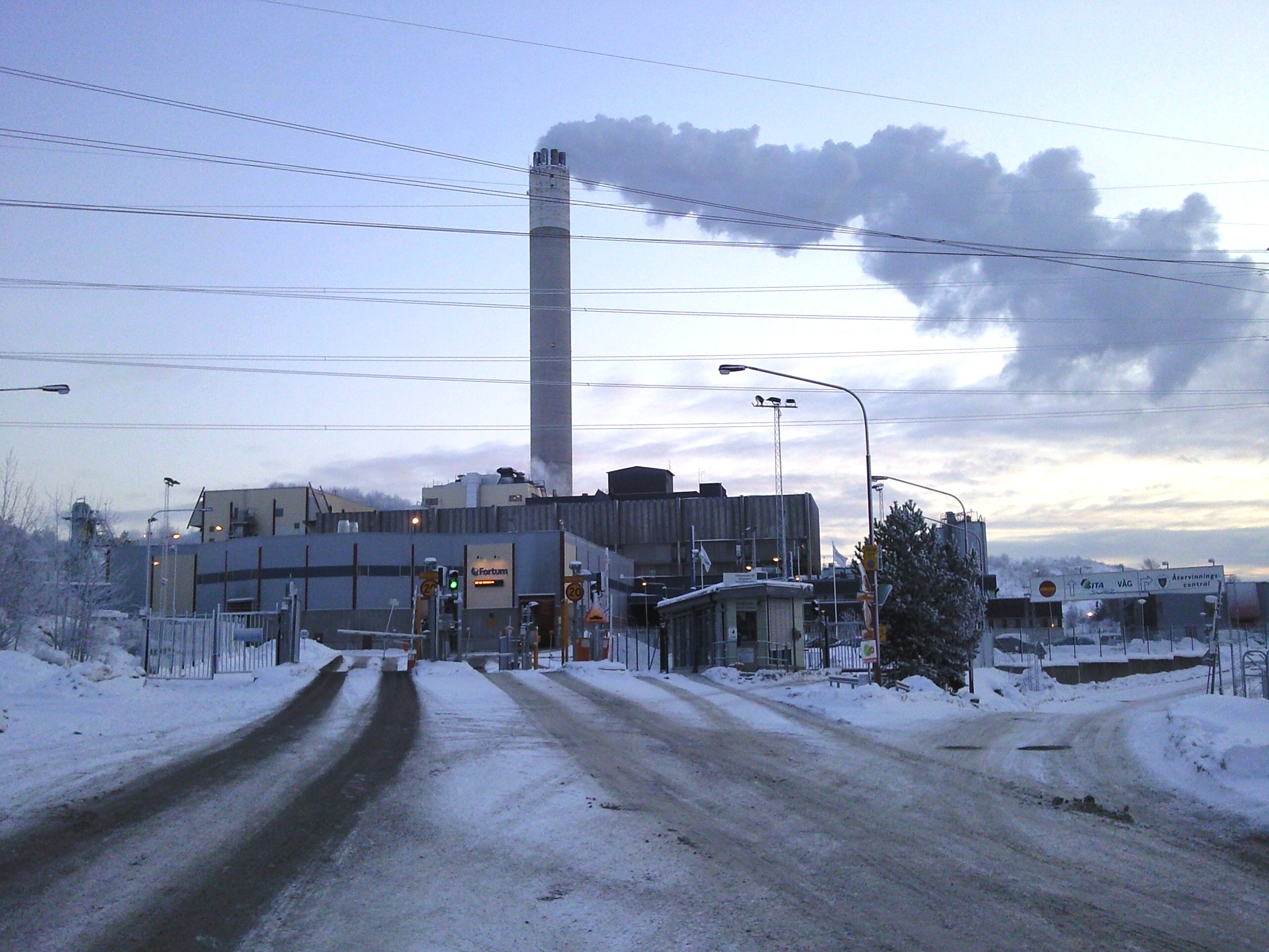 Högdalens kraftvärmeverk